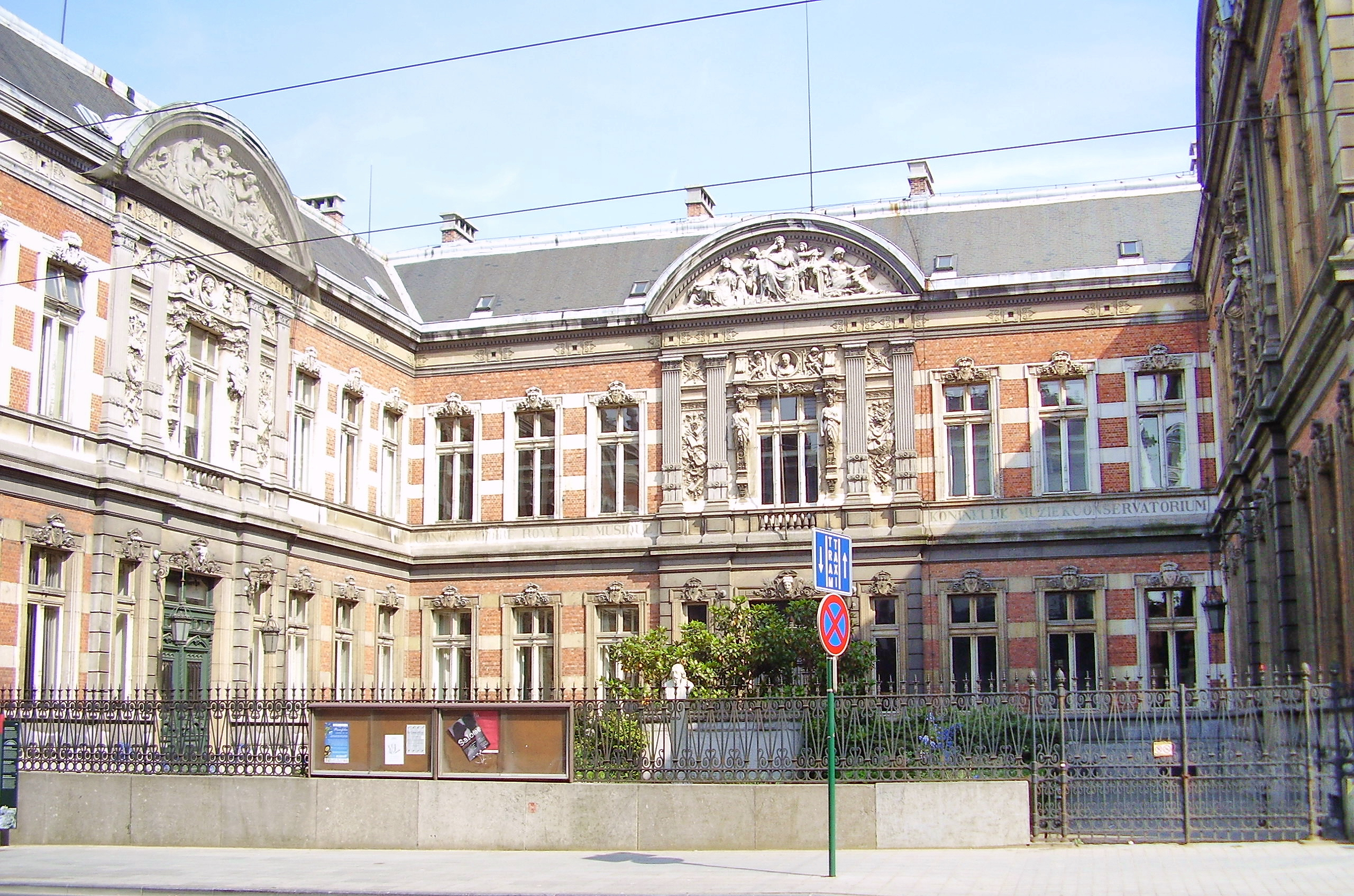 Description: Conservatoire royal de musique de Bruxelles, architecte Jean-Pierre Cluysenaar Author: User:Ben2 Date of creation: 20 juin 2006 Source: Photo personnelle